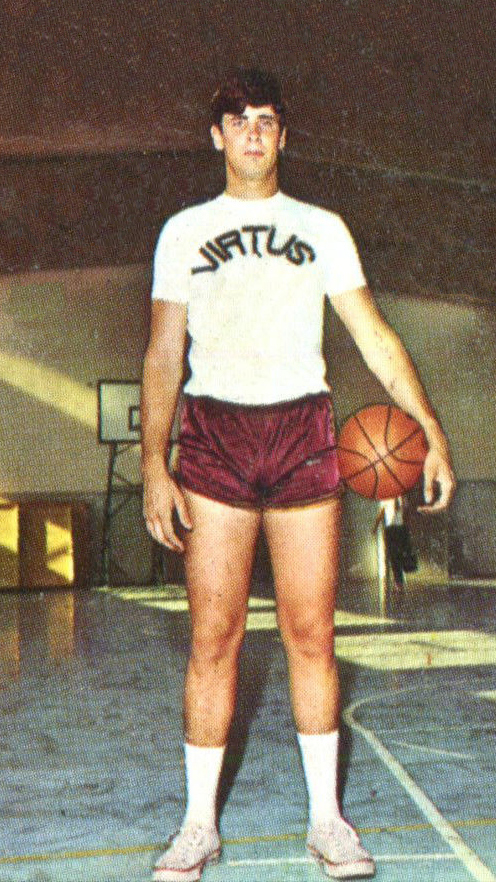 CAMPIONI DELLO SPORT 1969/70- n. 320 - DRISCOLL (USA)-PALLACANESTRO